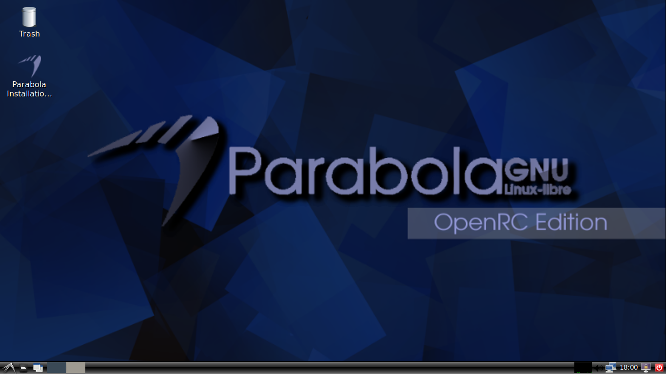 Parabola в окружении рабочего стола lxde